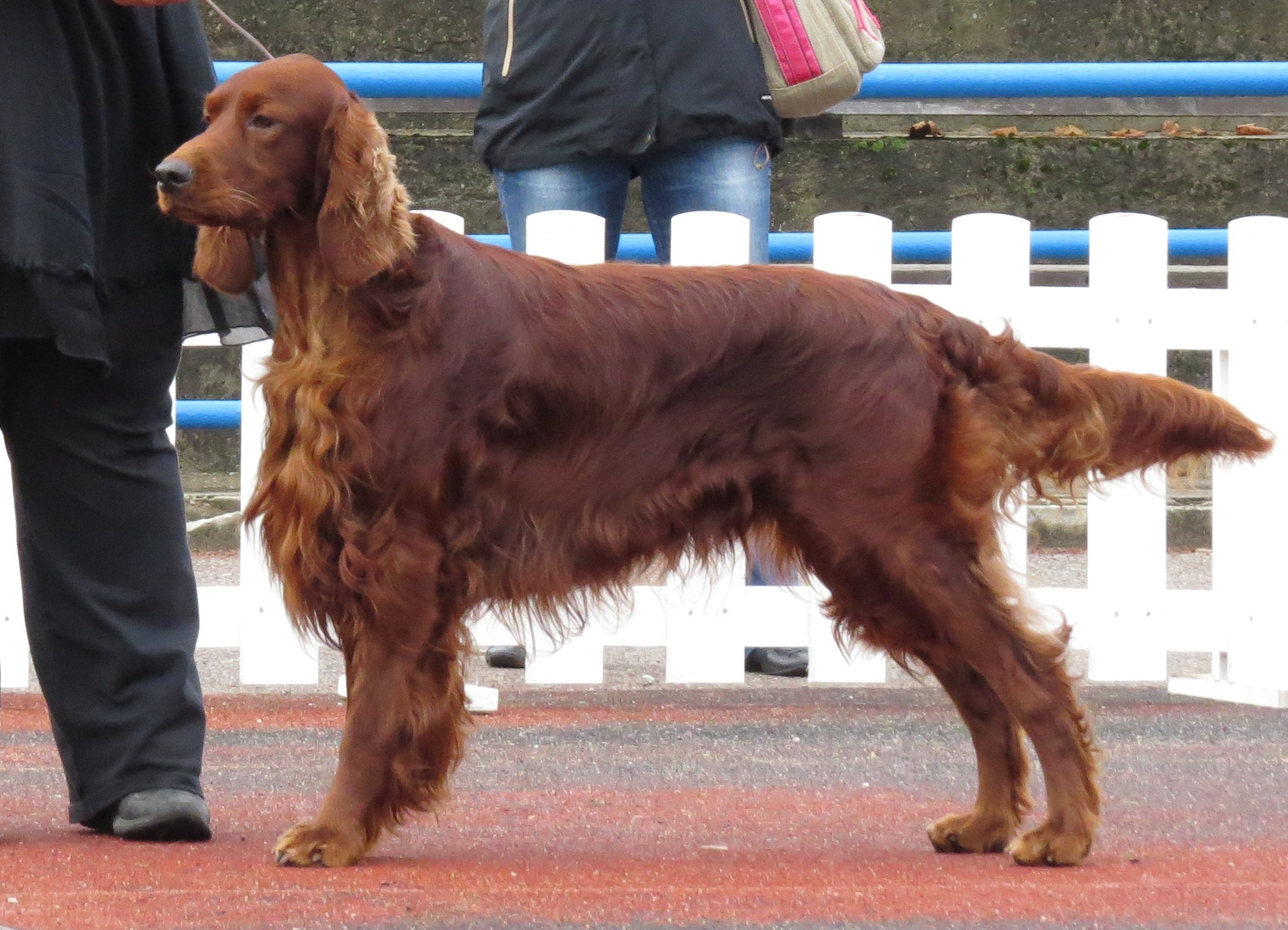 Irish Setter in Tallinn, duo CACIB, 17-18 Aug 2013